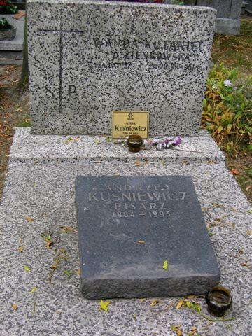 Andrzej Kuśniewicz's monument (Powązki Cemetery; Cmentarz Komunalny, d. Wojskowy)